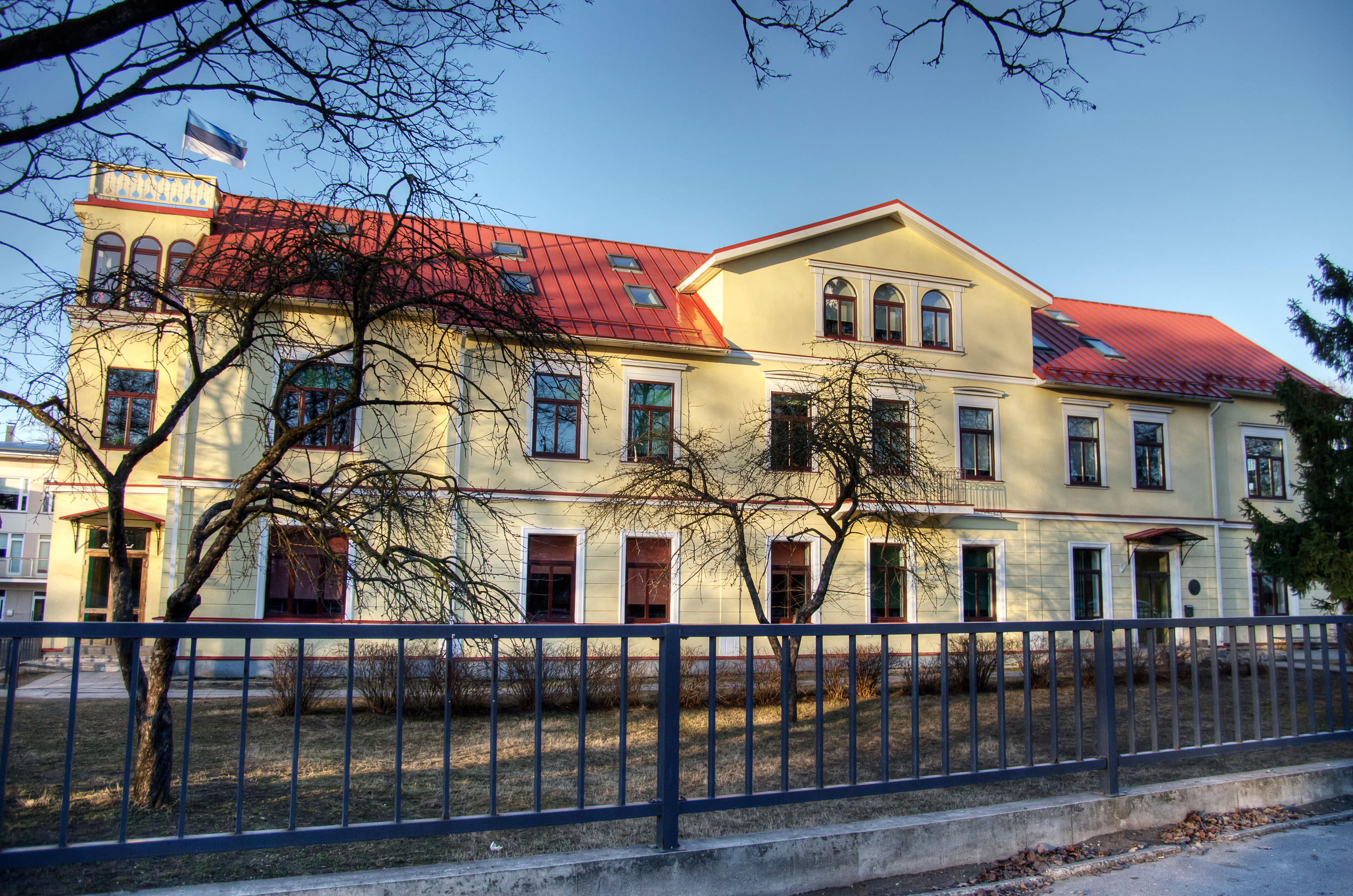 Tartu Katoliku Kool, Jakobi 41 Tartus